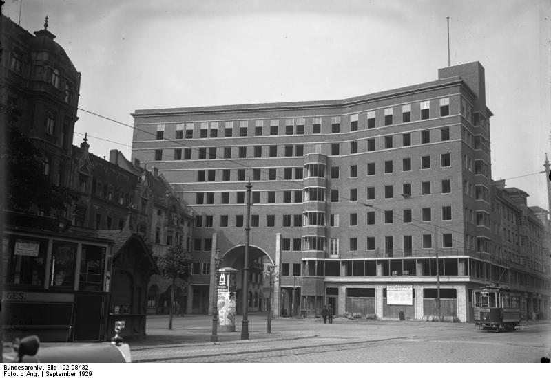 Das erste Hochhaus in Koblenz a/Rhein! Das erste Bürohaus in Koblenz a/Rhein, unweit des Hauptbahnhofes ist fertiggestellt.